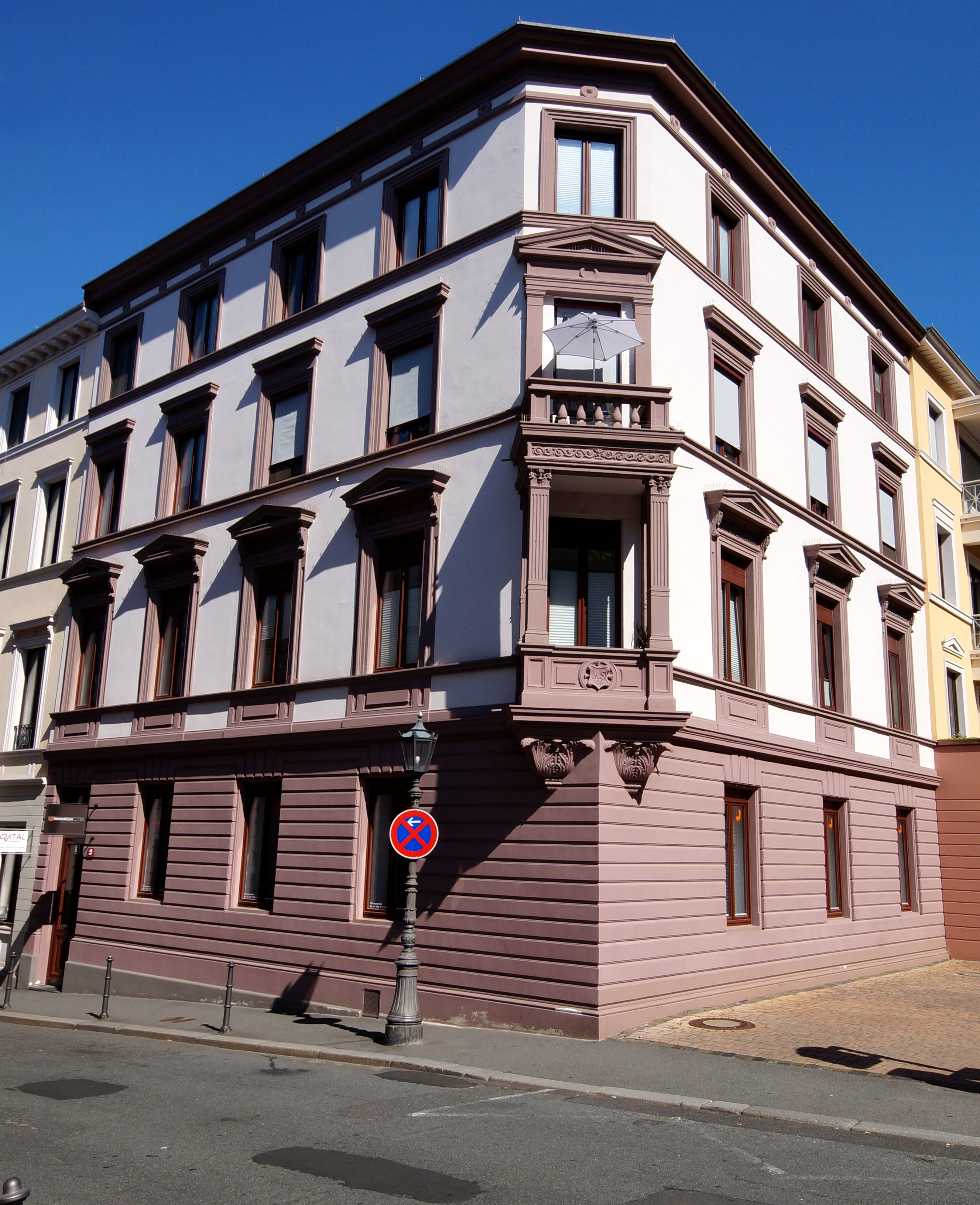 Fassade des Eckhauses Emmerich-Josef-Straße 2 in Mainz-Altstadt